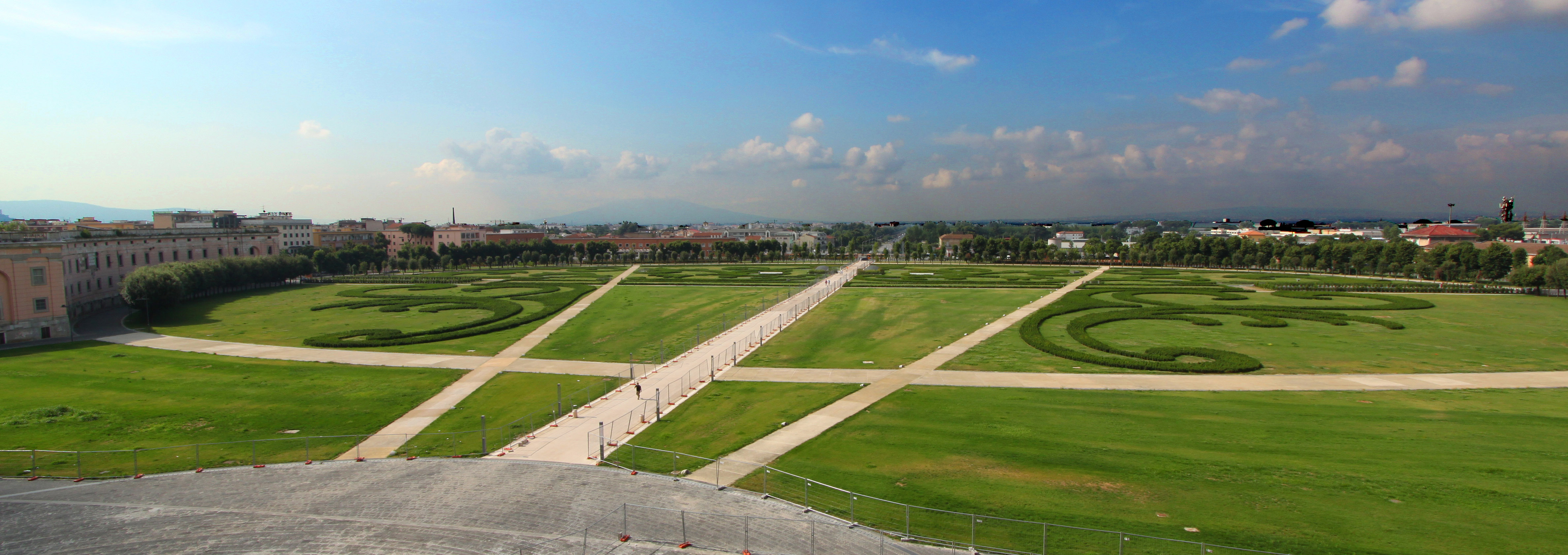 Dalle finestre della Reggia di Caserta, verso il Vesuvio